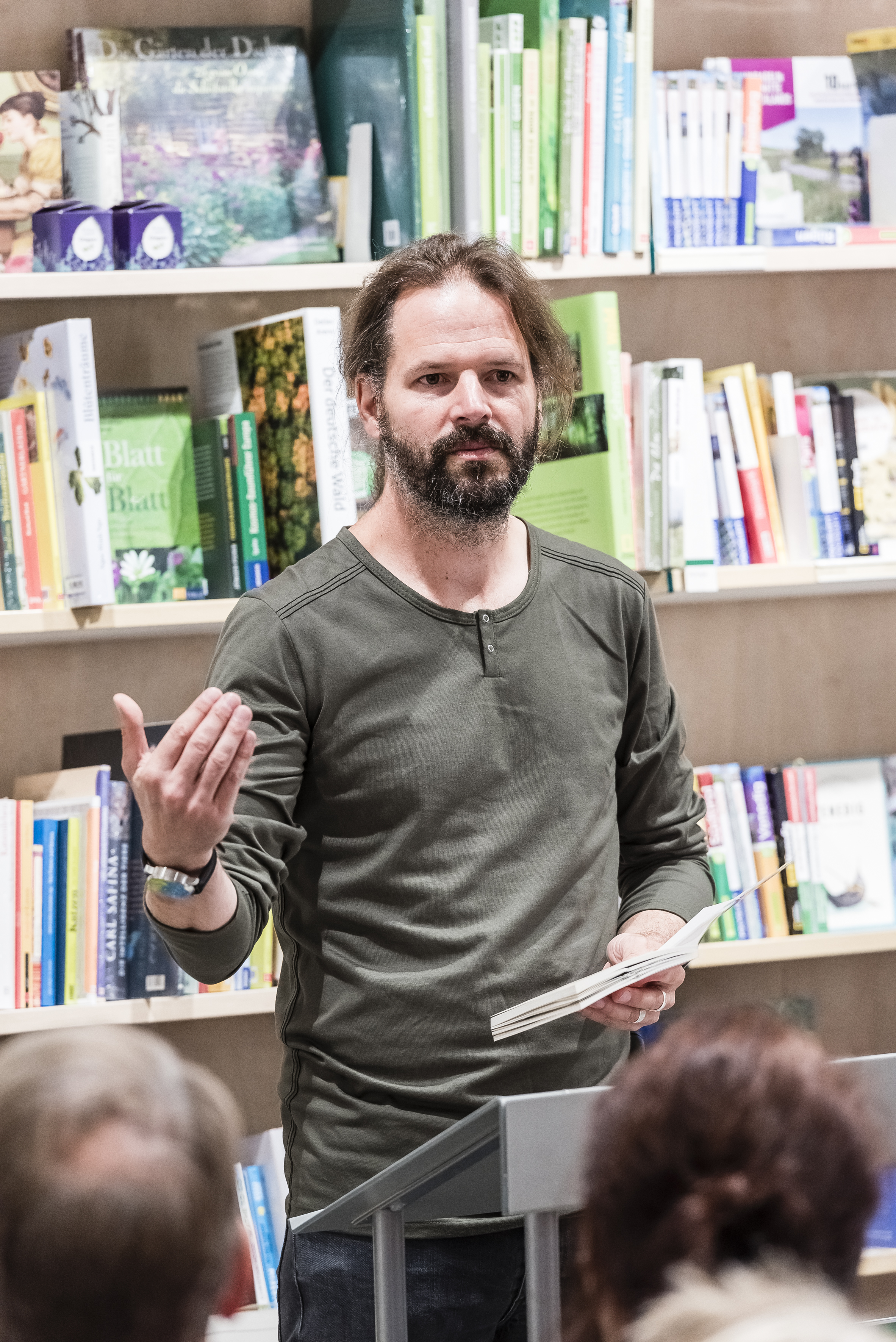 Portrait von Arne Ulbricht bei einer Lesung, Lizenz: CC-BY 4.0